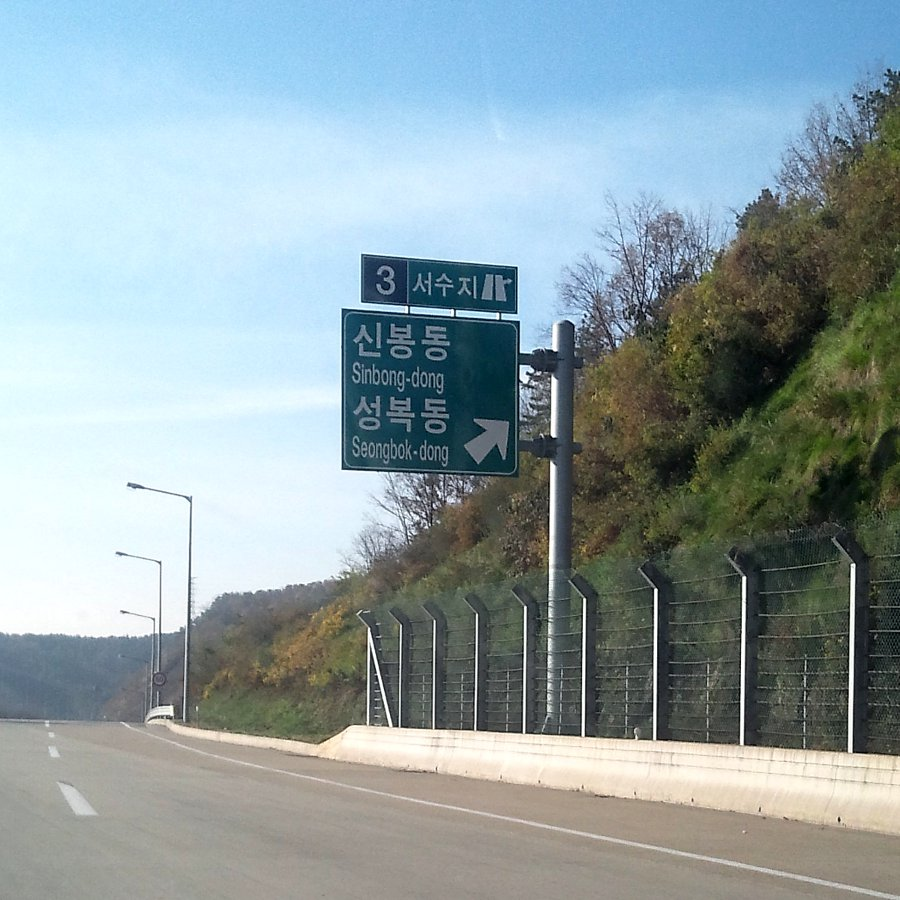 La sortie Seosuji de l'autoroute no.171 de Coree du sud.